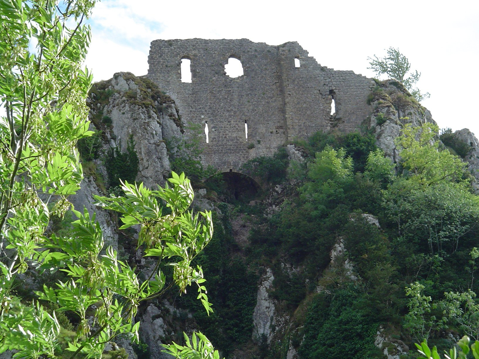 Château de Roquefixade (France,09)